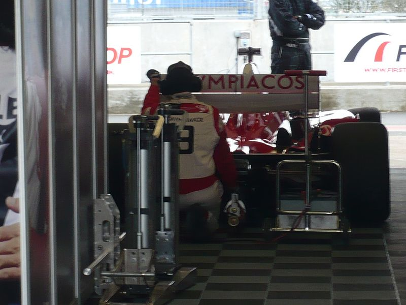 Equipo del Olympiacos Formula Team en el Pit Lane